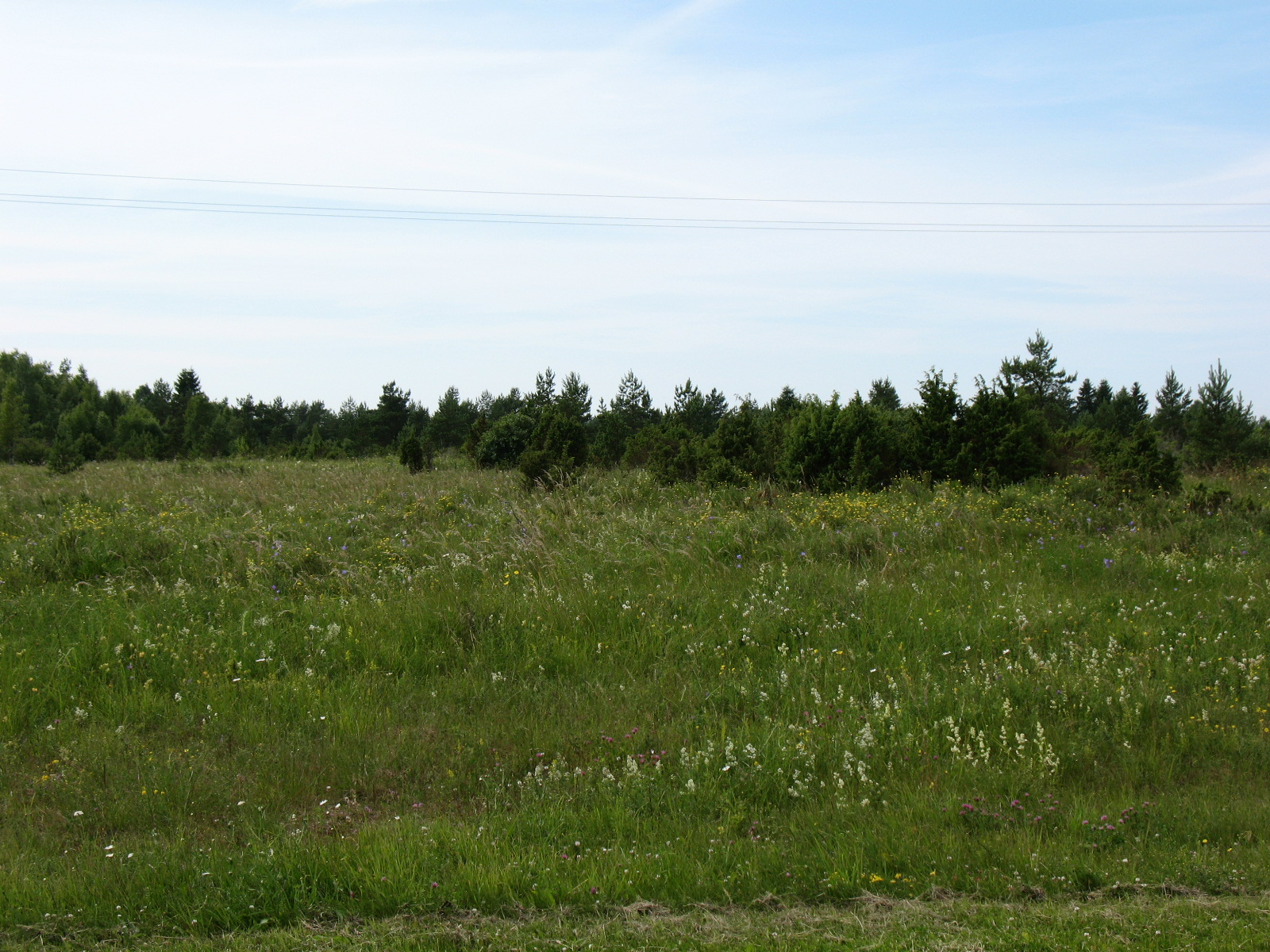 Kadakased niidud Vääna külas